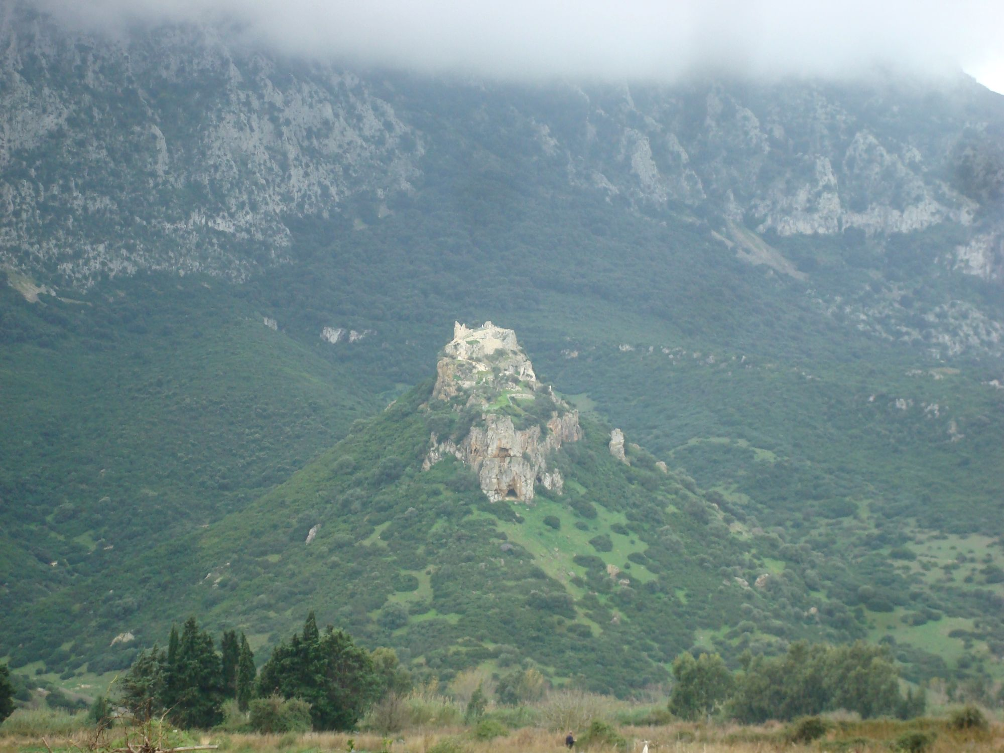 Il colle con i resti del castello di Pontes (Galtellì) visto dalla strada per Onifai.